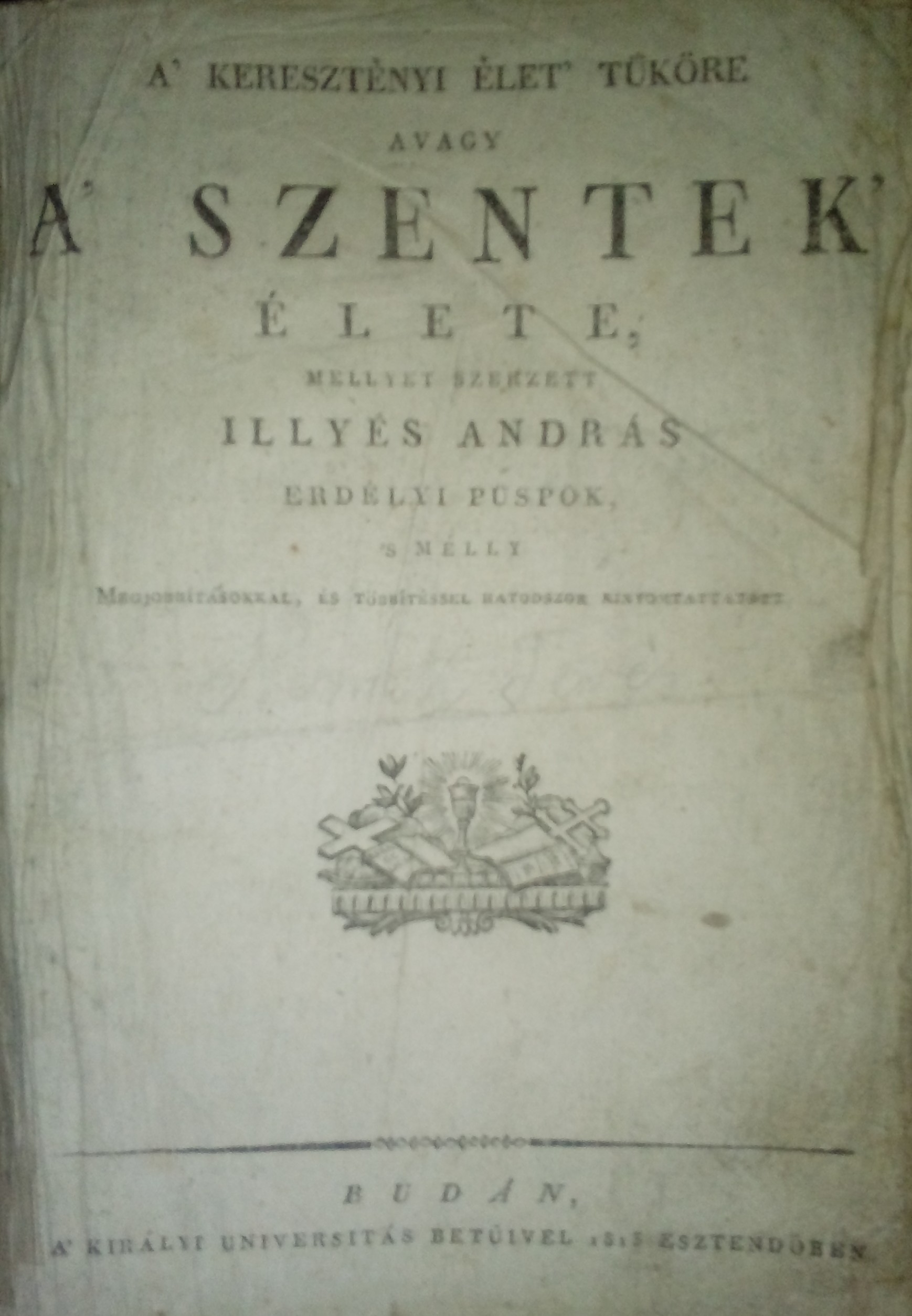 Az adott mű címlapja.